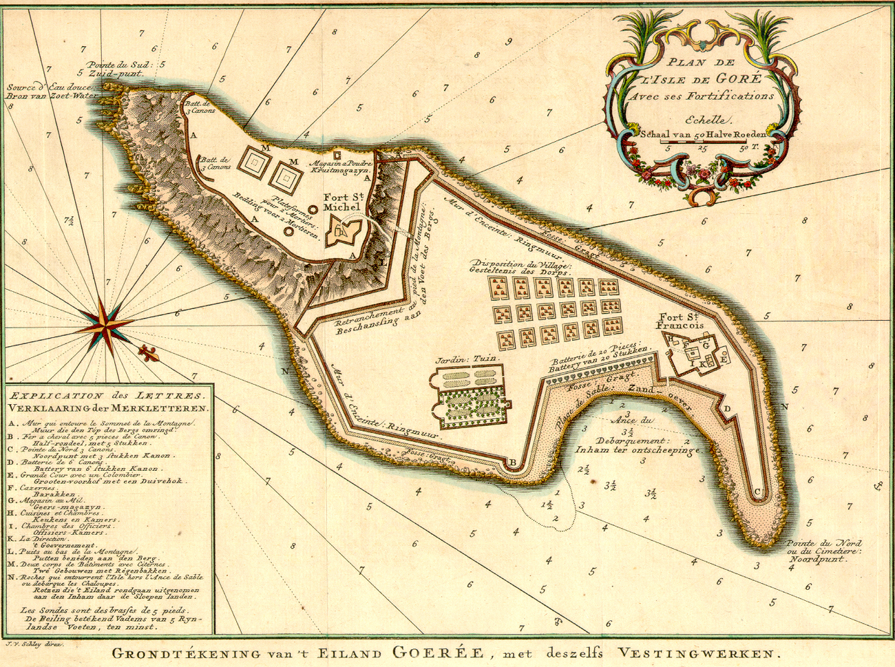 Schley, Jacobus van der, 1715-1779. Plan de l'Isle de Goré avec ses fortifications : Grondtekening van't eiland Goeree, met deszelfs Vestingwerken. Amsterdam, 1772